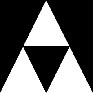 Reproducción del logo de la Editorial Anagrama